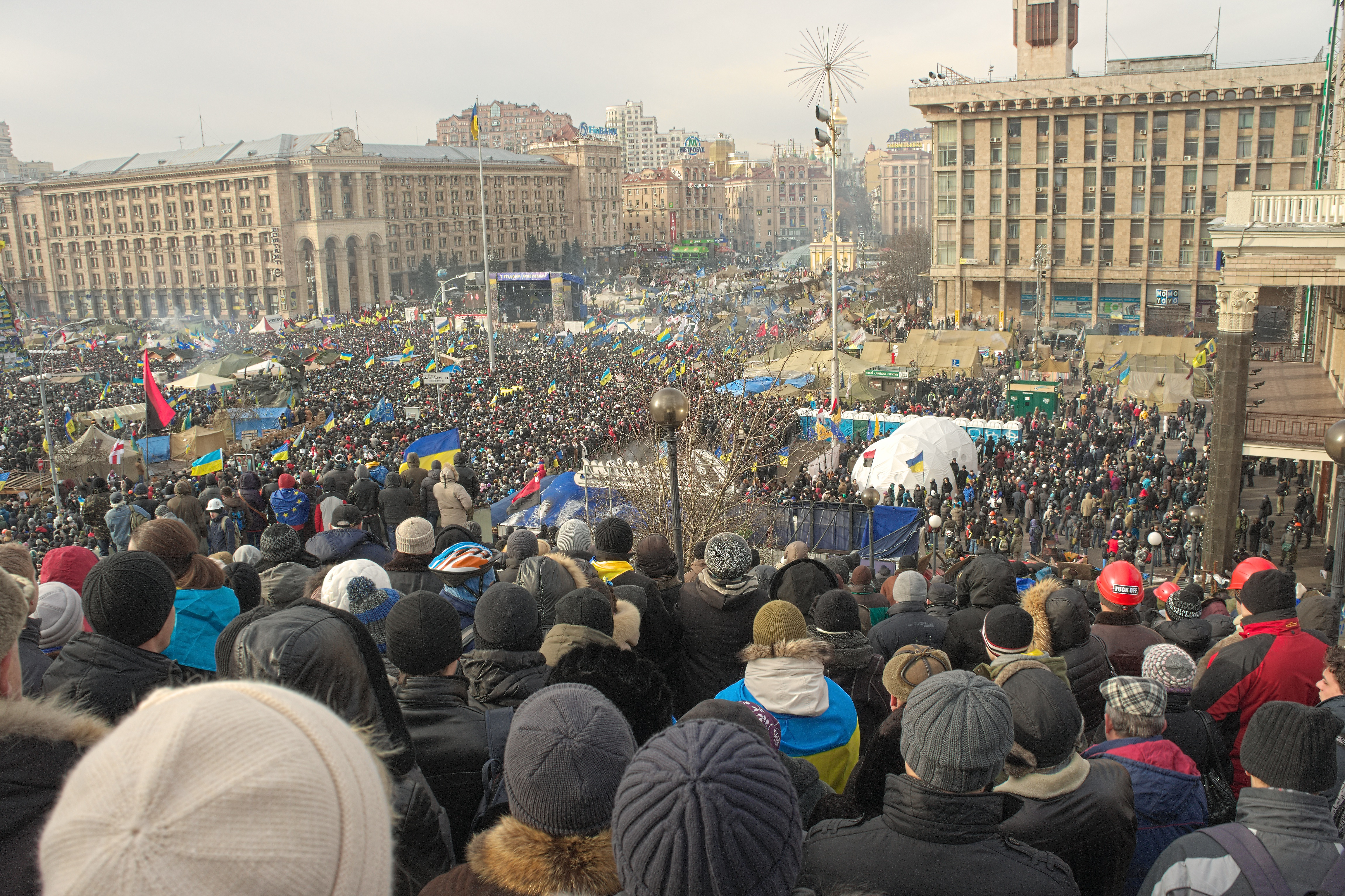 Майдан з пагорбів. Maidan from the hills.